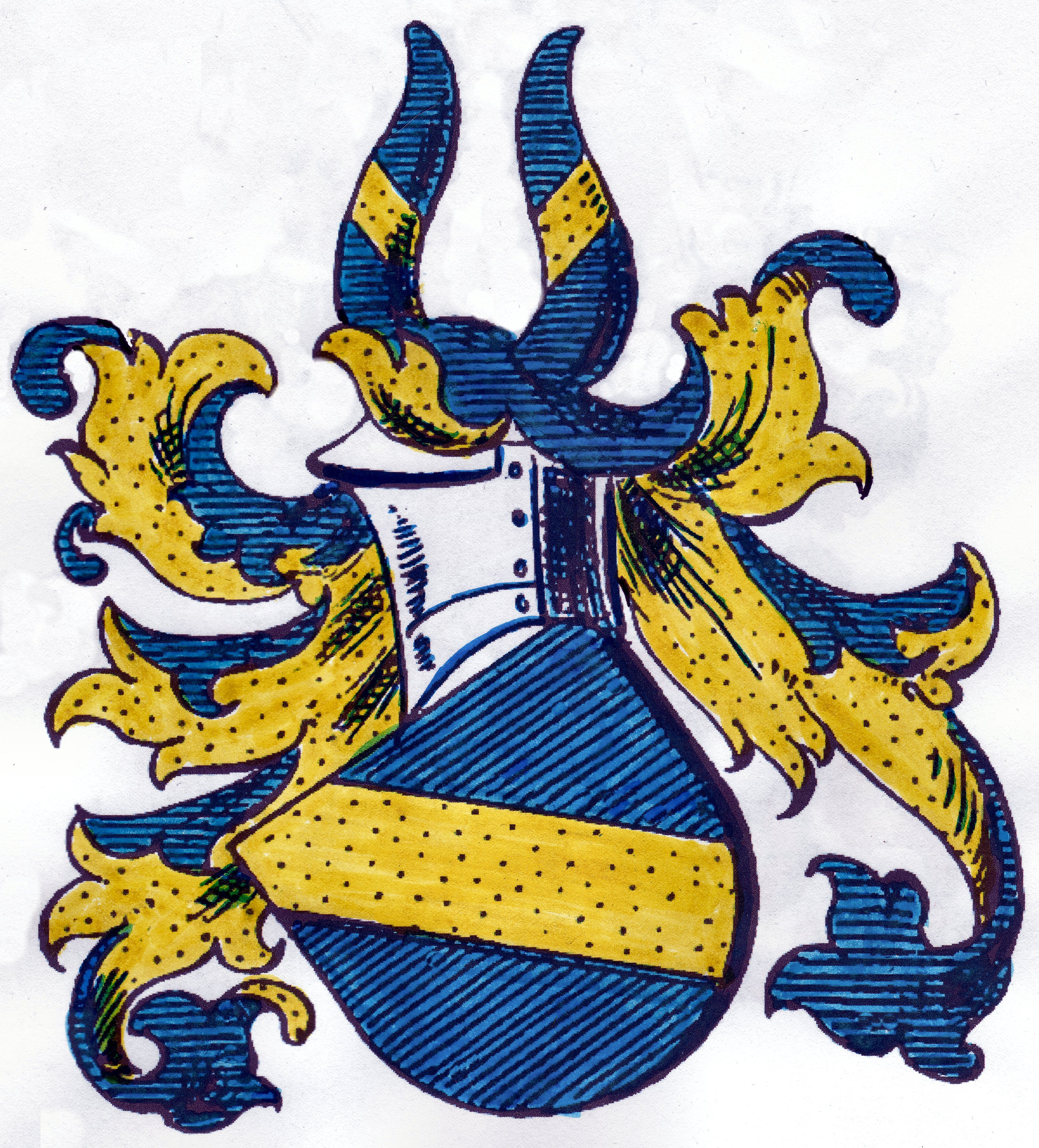 Stammwappen derer von Thun und Hohenstein seit 1127